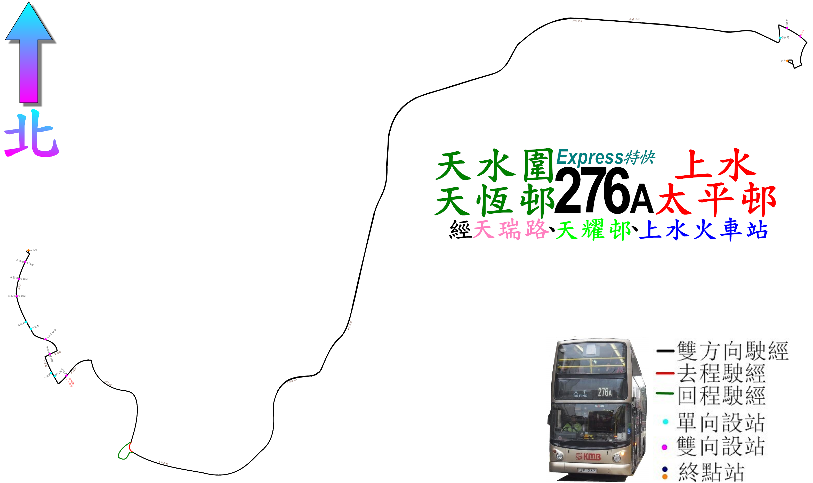 中文（香港）: 九巴276A線的走線圖